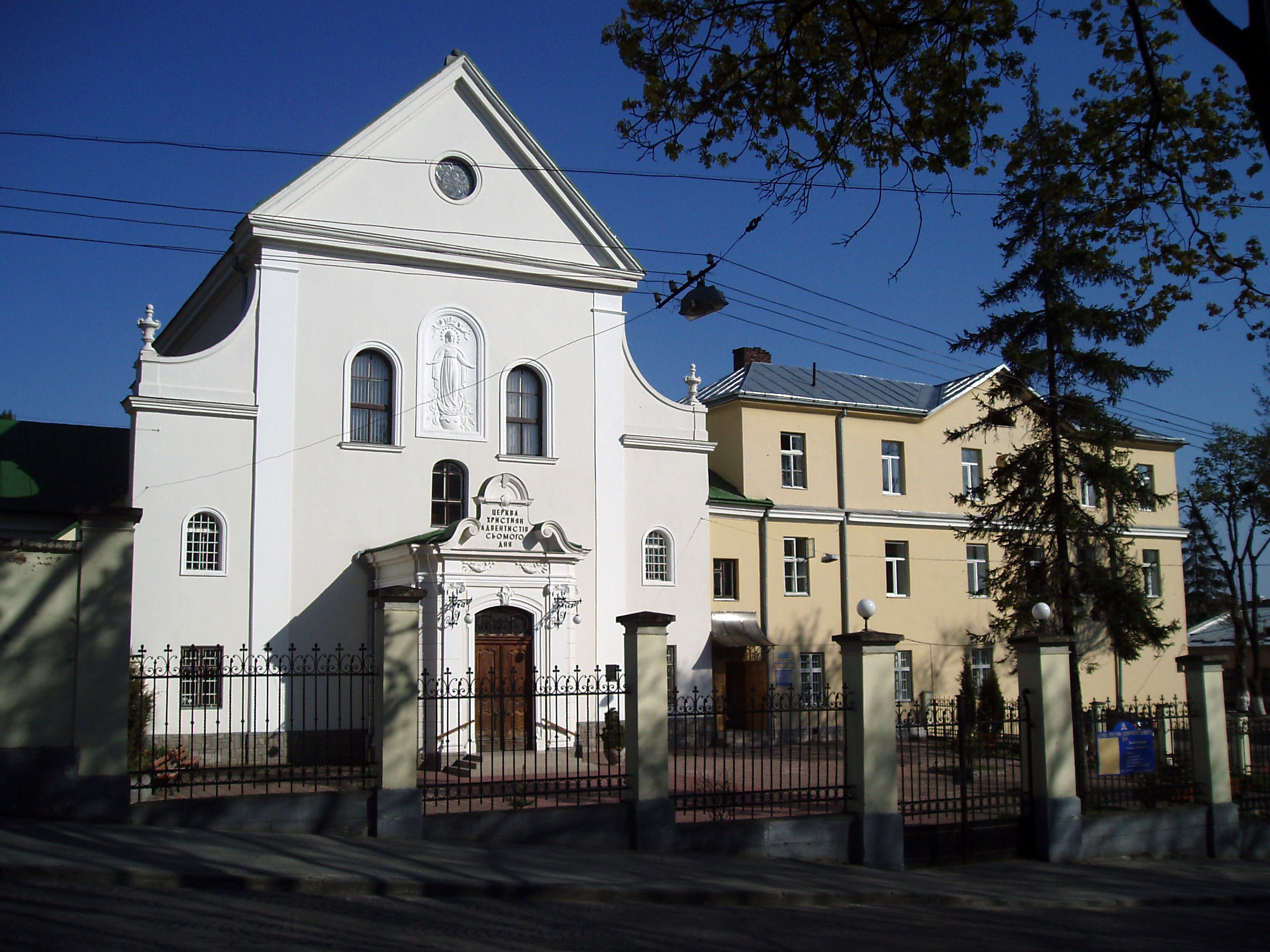 Колишній костел і монастир францисканців у Львові. Вулиця Короленка 1